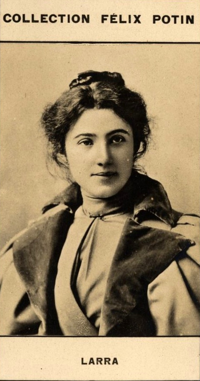 Lara, Louise